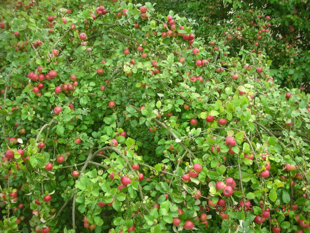 Apfelbaum von oben